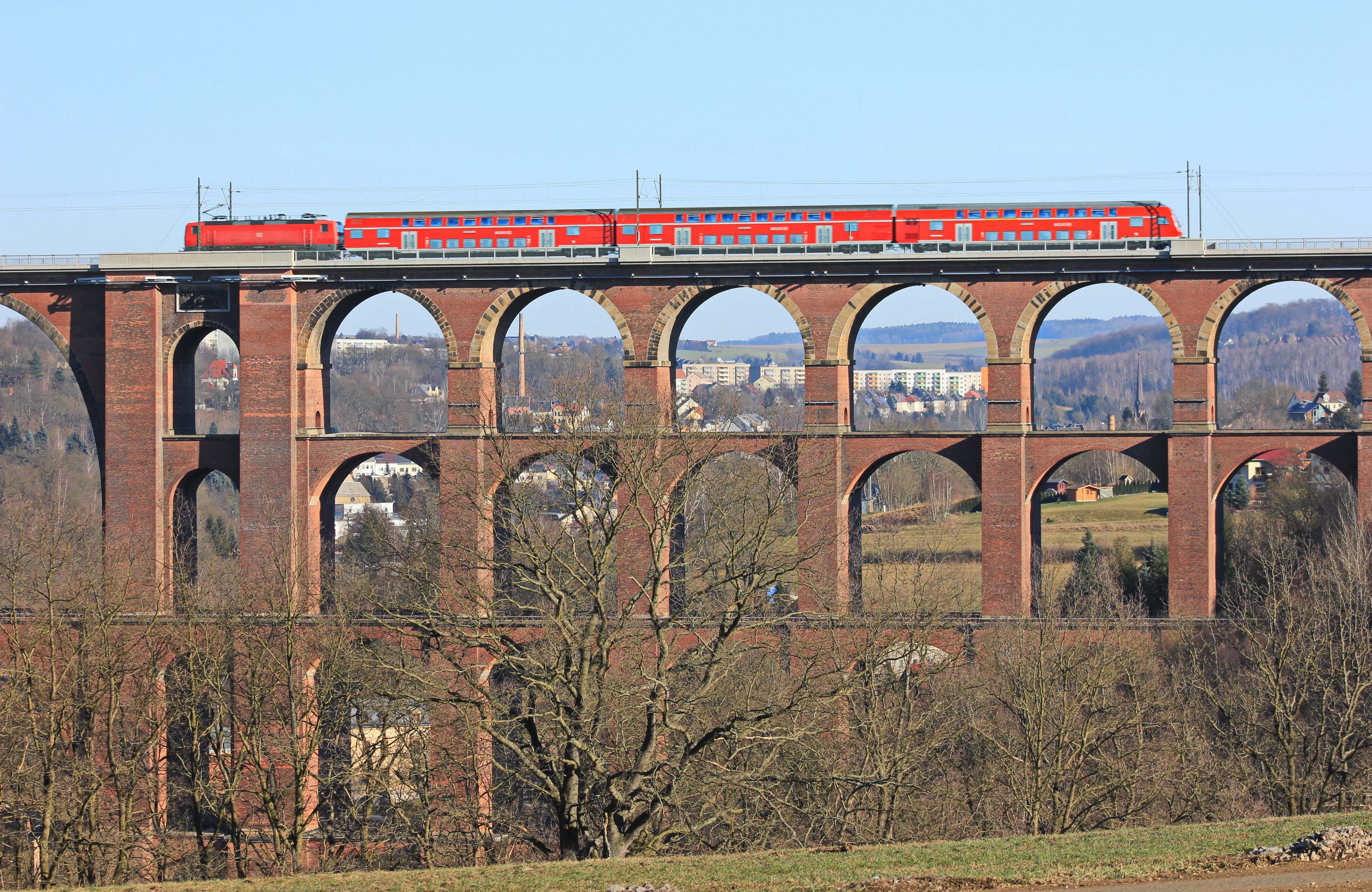 Die Göltzschtalbrücke im sächsischen Vogtlandkreis und die größte Ziegelstein­brücke der Welt.